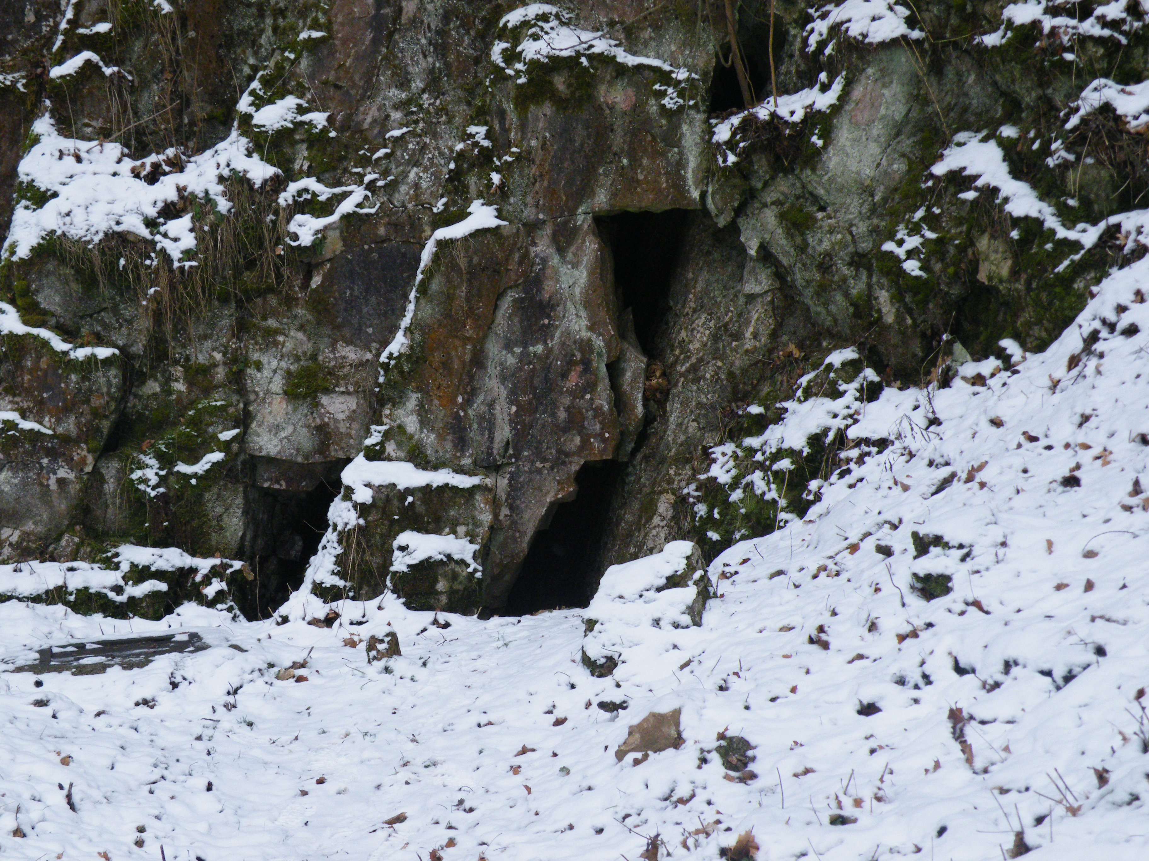 Horní Albeřice v Ӏomu u jeskyní